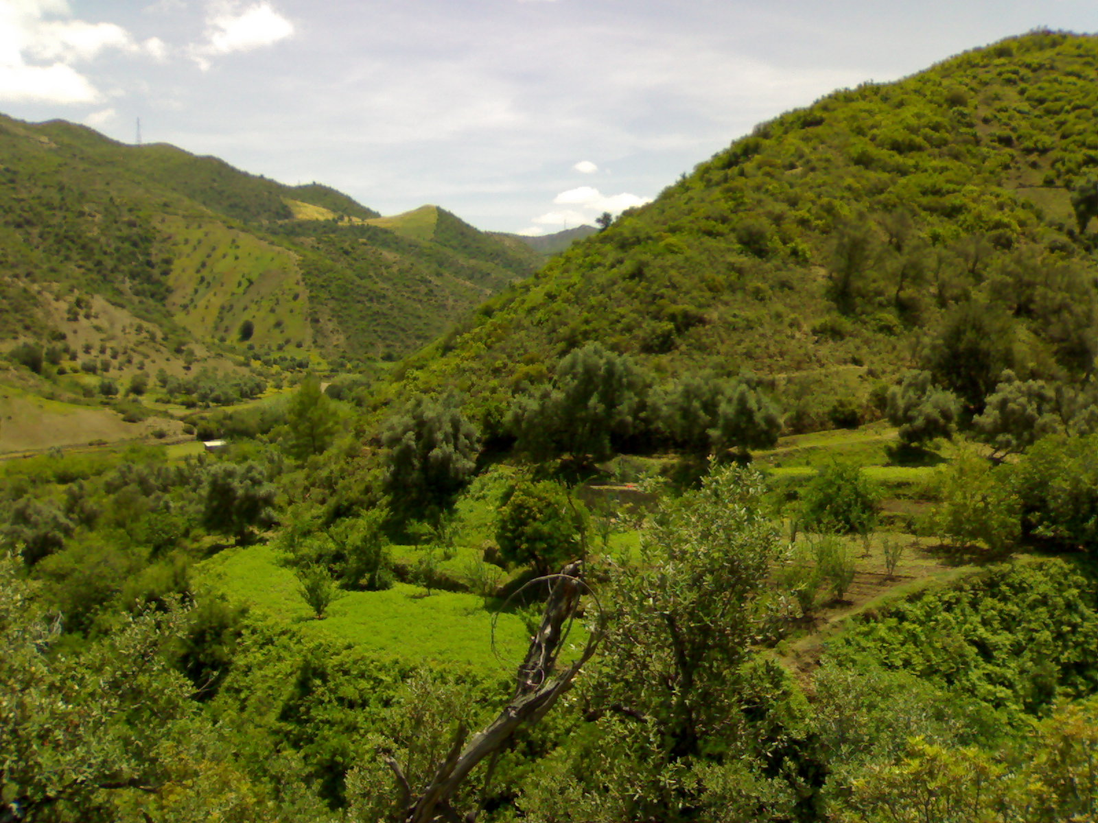 منطقة بني شعيب غزاوة السفلى